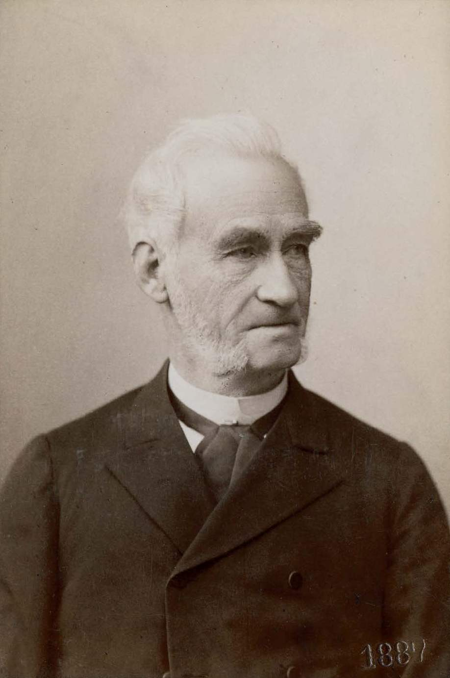 Bernhard Joseph Hubert Windscheid